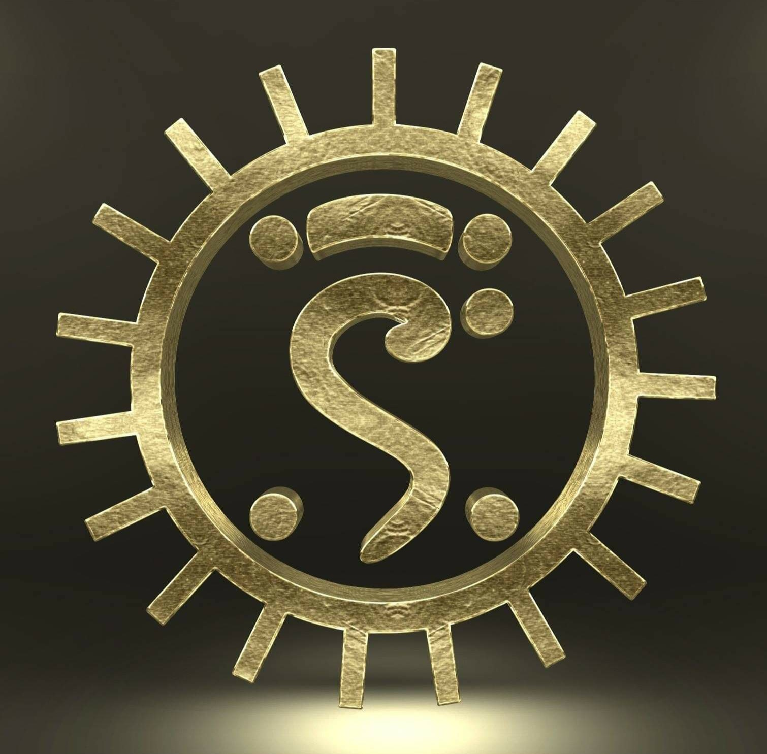 ꯃꯤꯇꯩ ꯂꯣꯟ: ꯁꯅꯥꯃꯍꯤ ꯂꯥꯏꯅꯤꯡ ꯁꯛꯇꯝ꯫